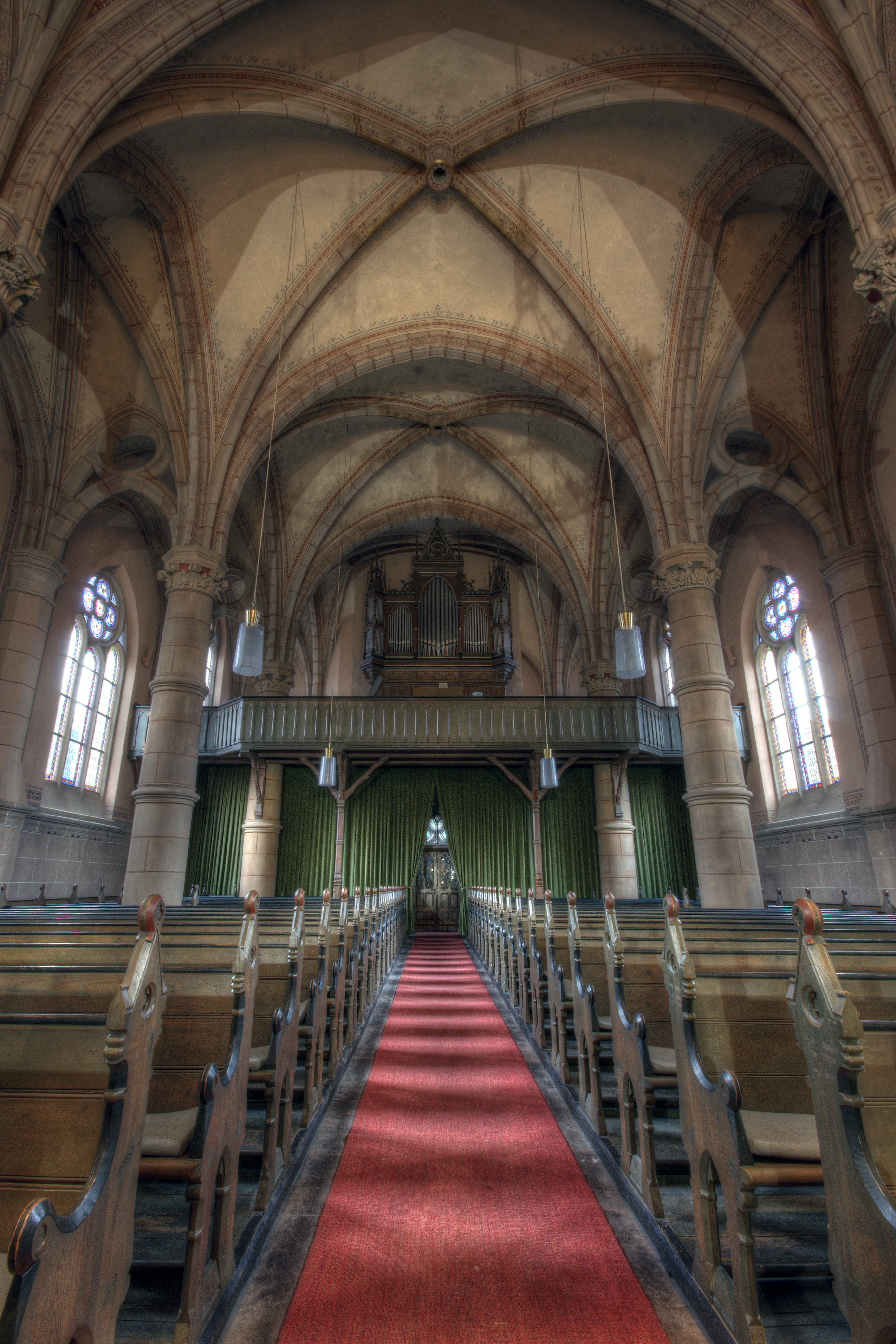 ev. Stadtkirche Wanfried, Innenraum mit Blick auf die Orgel und Eingang